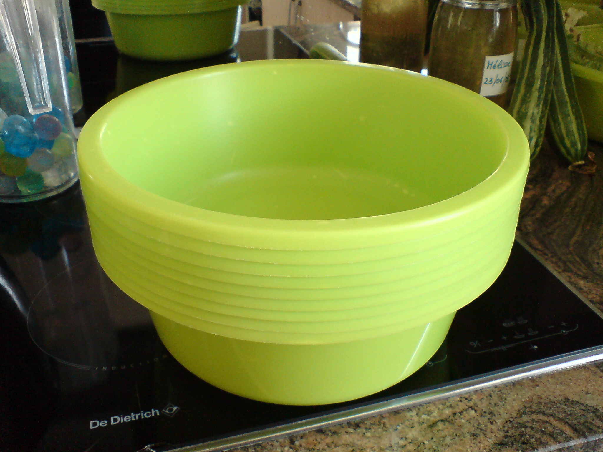 Il s'agit simplement d'un pile de cuvettes vertes en plastique.